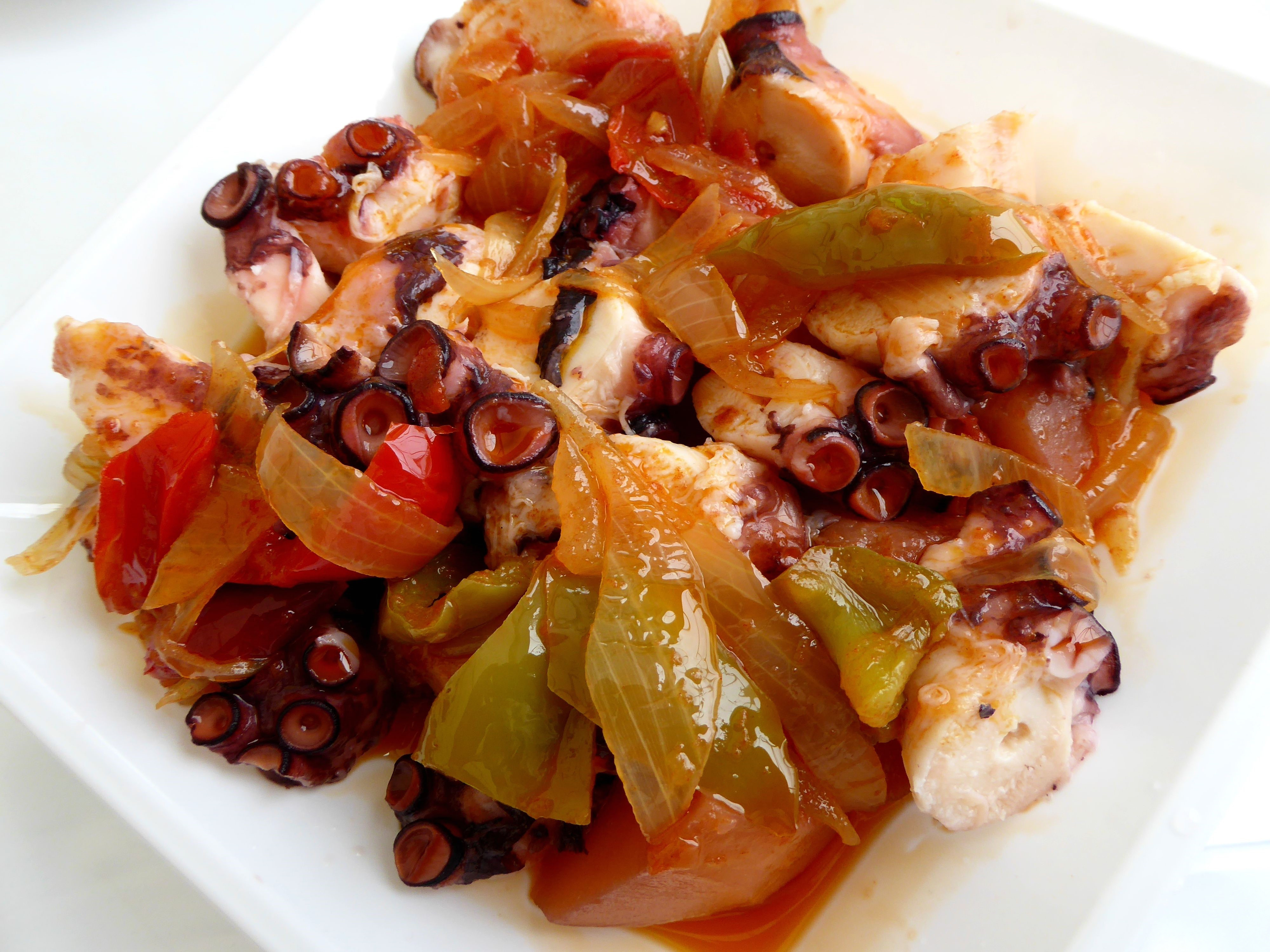 Prato de polbo á mugardesa, preparado na Festa do Polbo de Bueu.